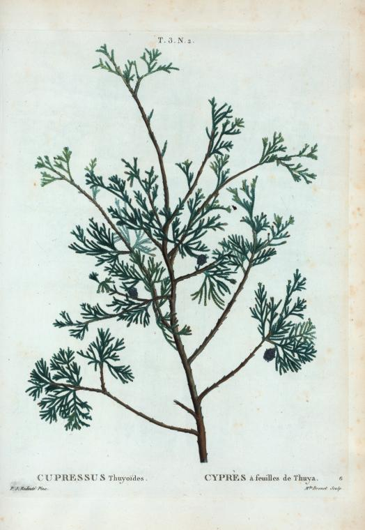 Cupressus Thuyoides = Chamaecyparis thyoides = Cyprès à feuilles de Thuya.